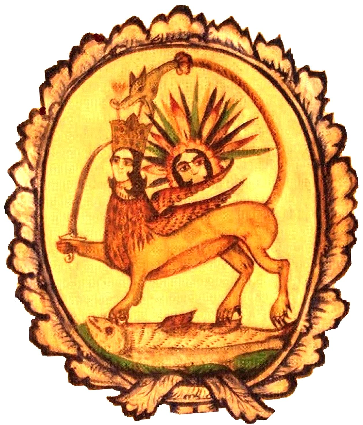 Şəkinin gerbi